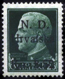 Марка, выпущенная в Шибенике (Независимое государство Хорватия) Stamp for Shibenik issued by the Independent State of Croatia(NDH)